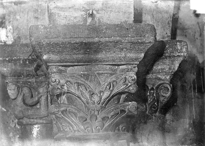 Chapiteau